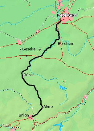 Die Bahnstrecke Geseke-Büren Kartenquelle: [1]